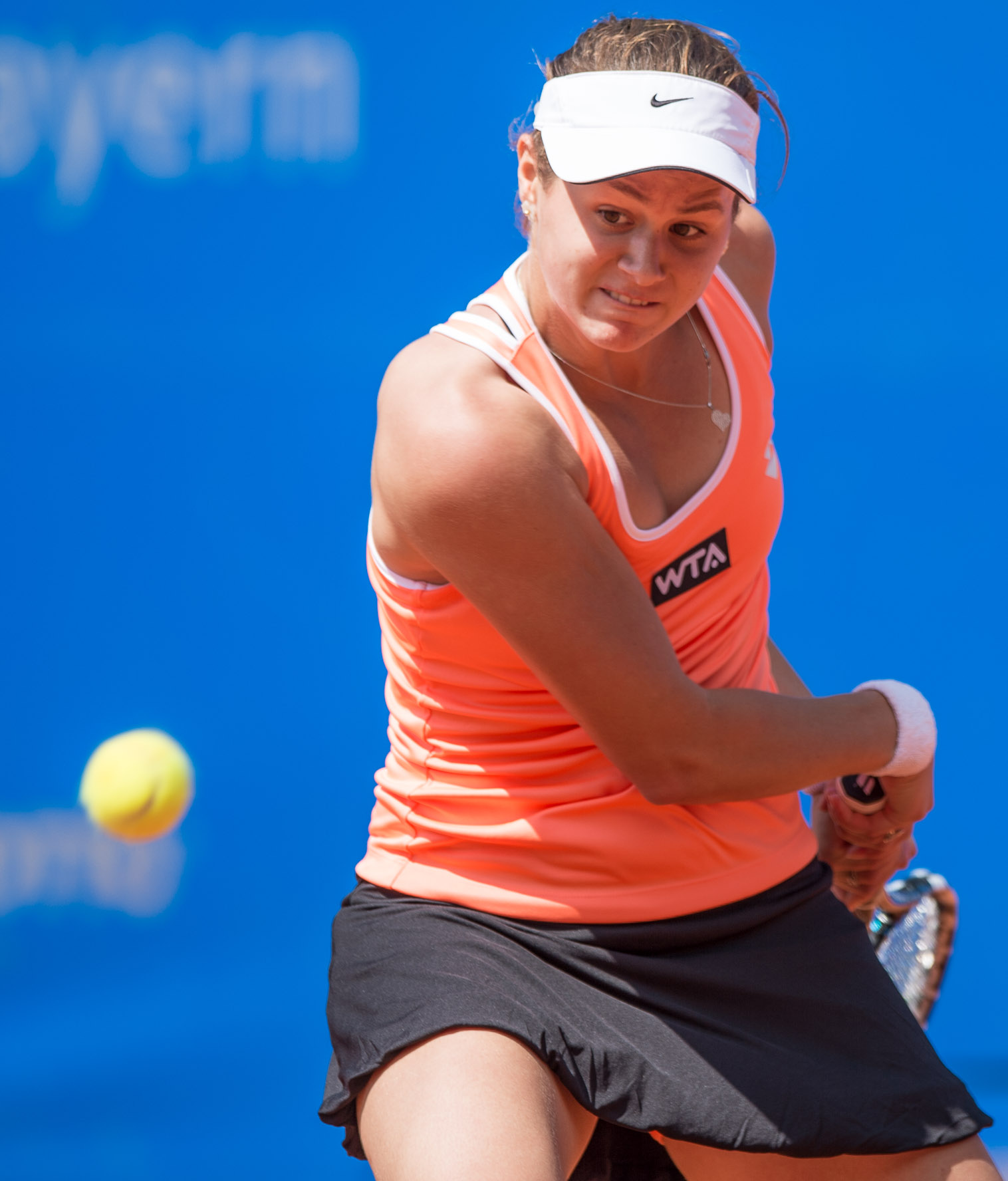 Damentennis,Jana Cepelova,Jana Cepelová,Nürnberger Versicherungscup 2014,Tennis,WTA